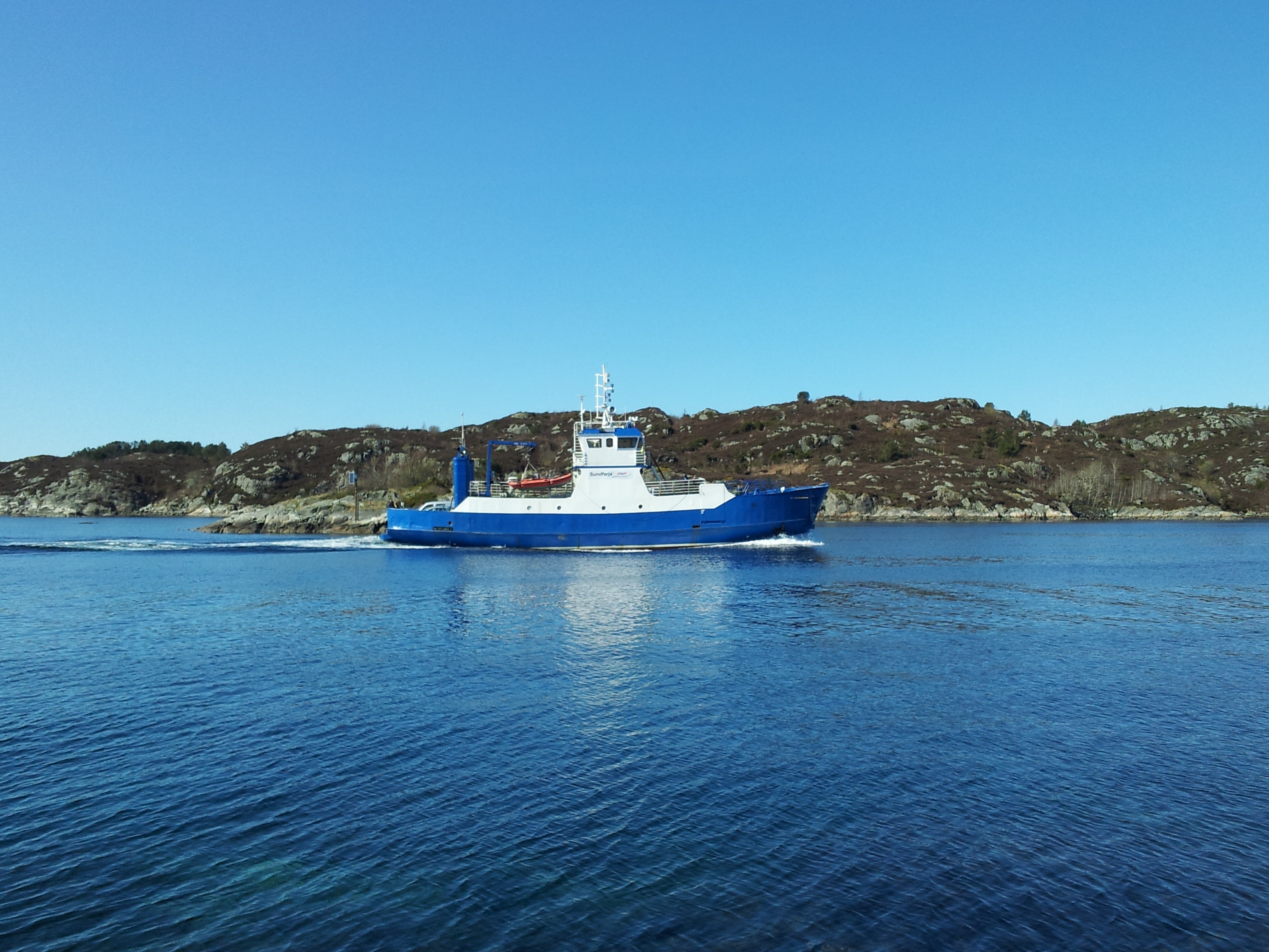 MF "Sundferja" i Vibærsundet mellom Bjelkarøy og Bjelkarøy-Buarøy